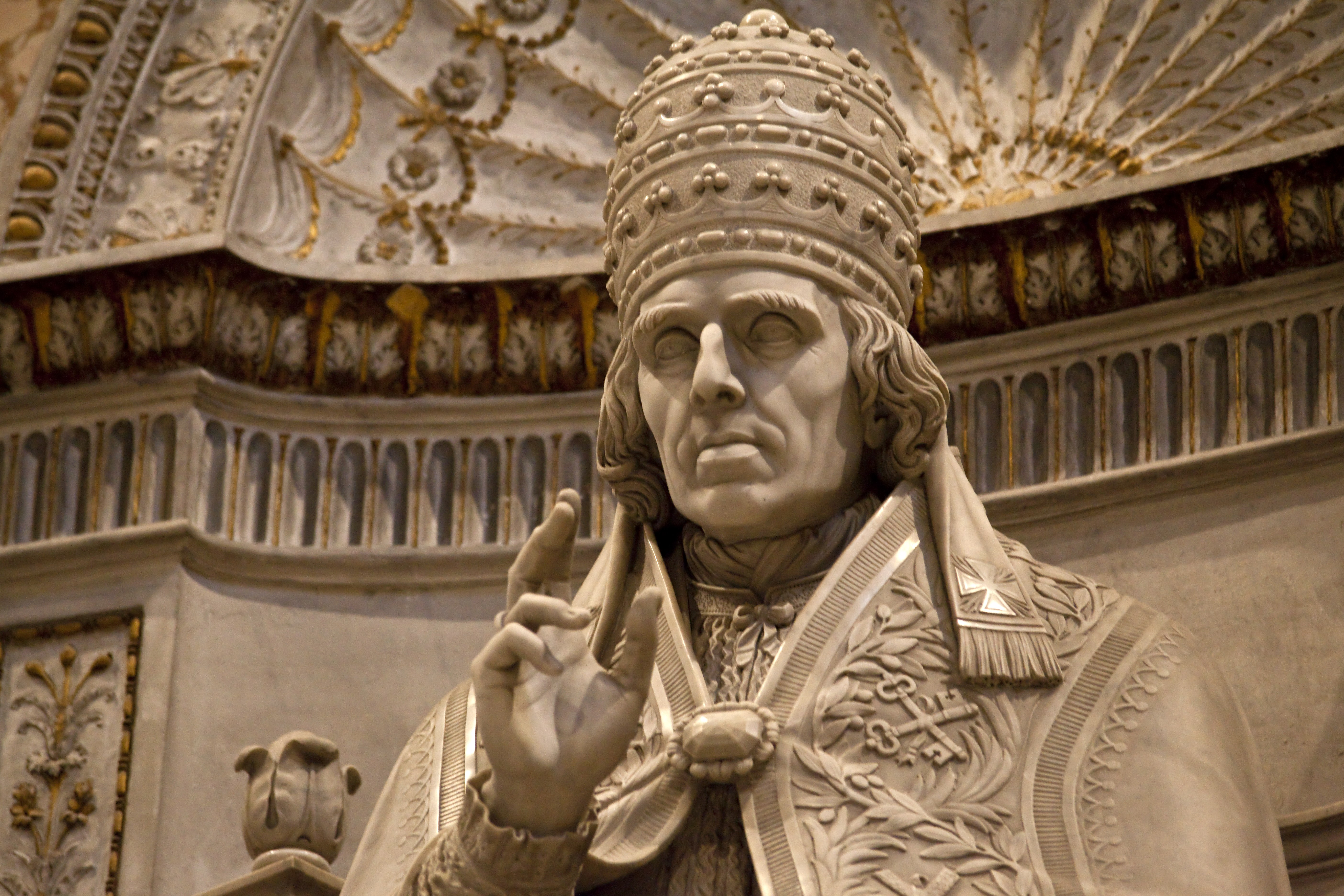 Grabmonument Pius VI. von Thorwaldsen in St. Peter (Rom)